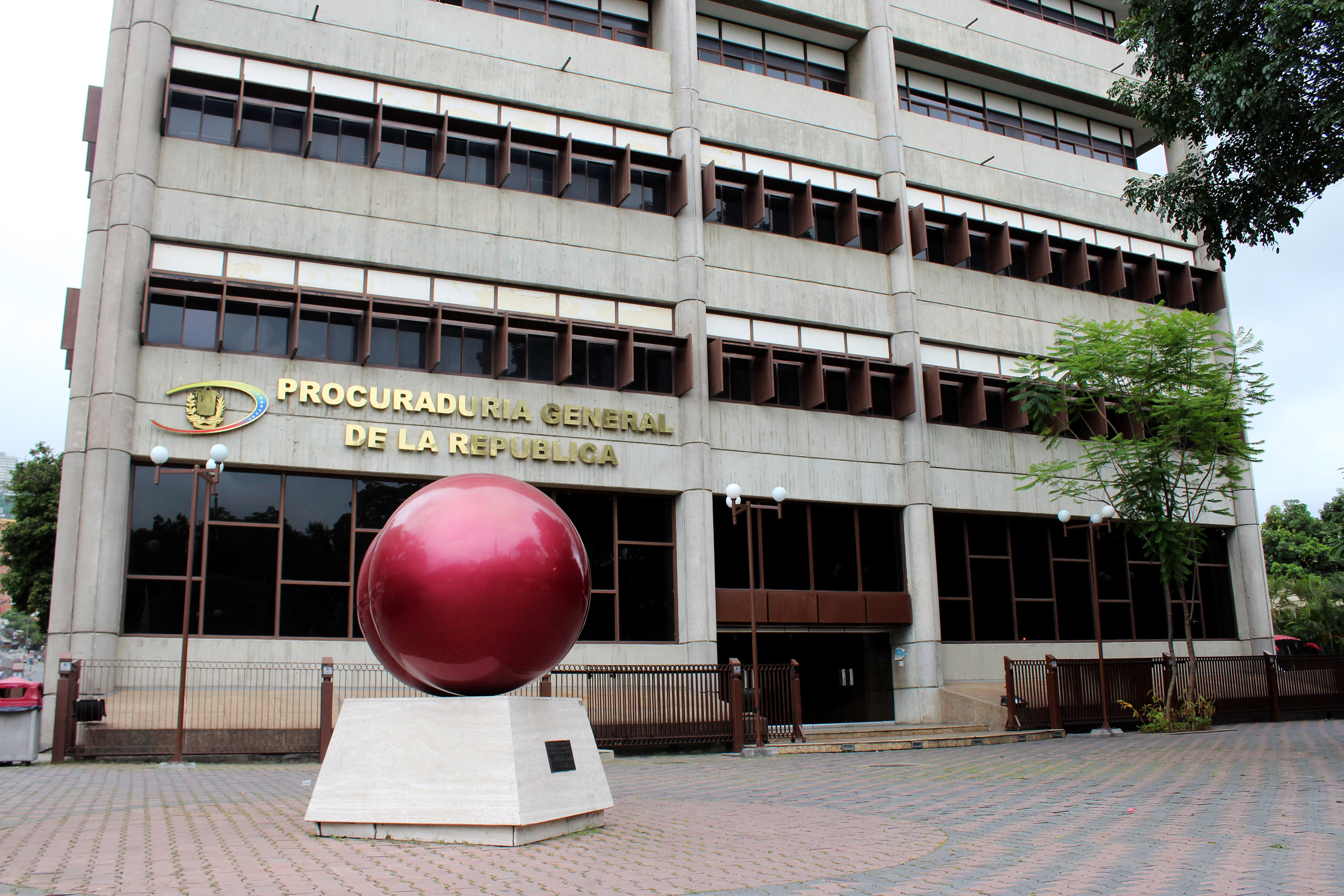 Procuraduria General de la Republica Bolivariana de Venezuela